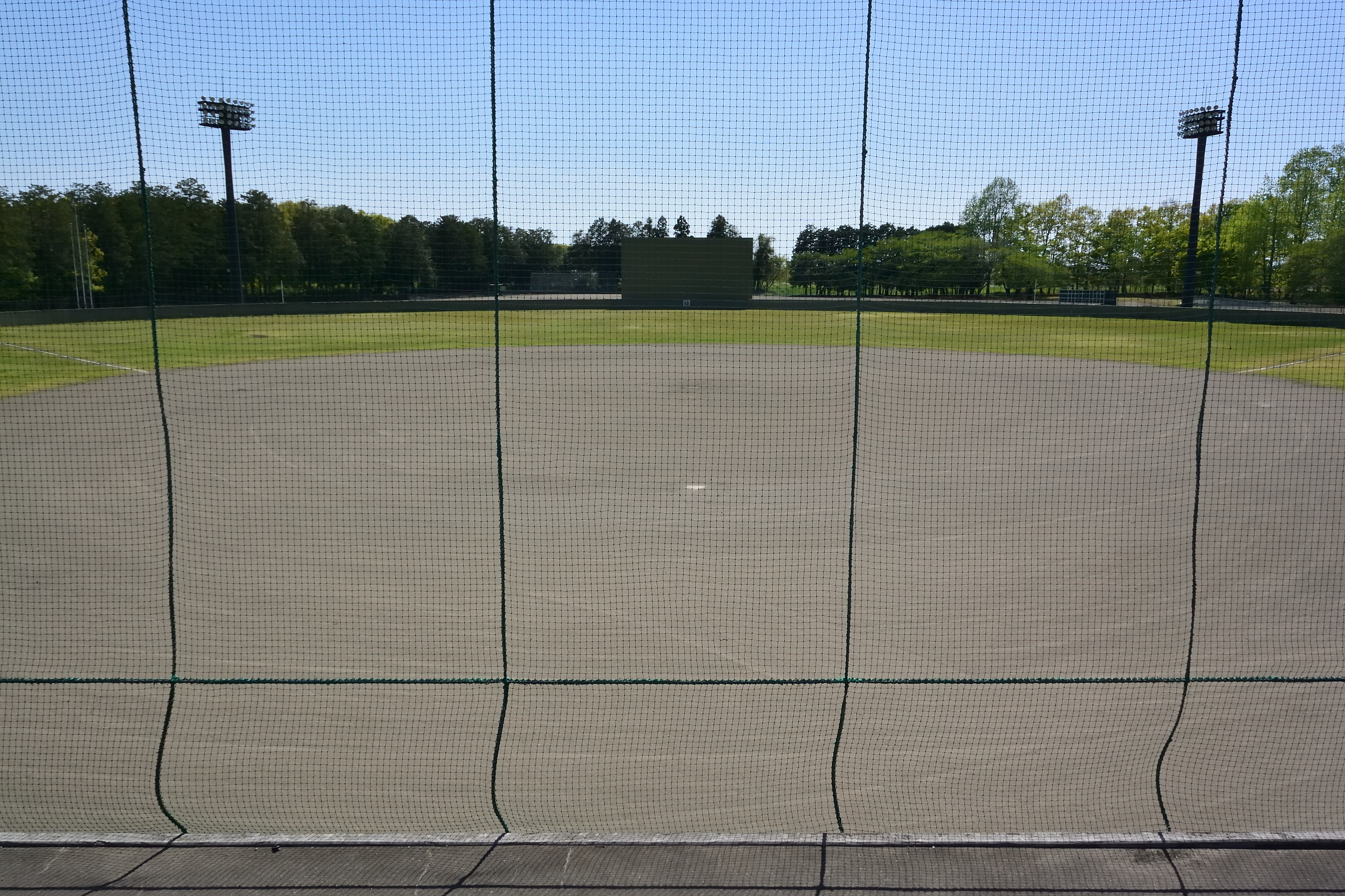 真岡市東運動場